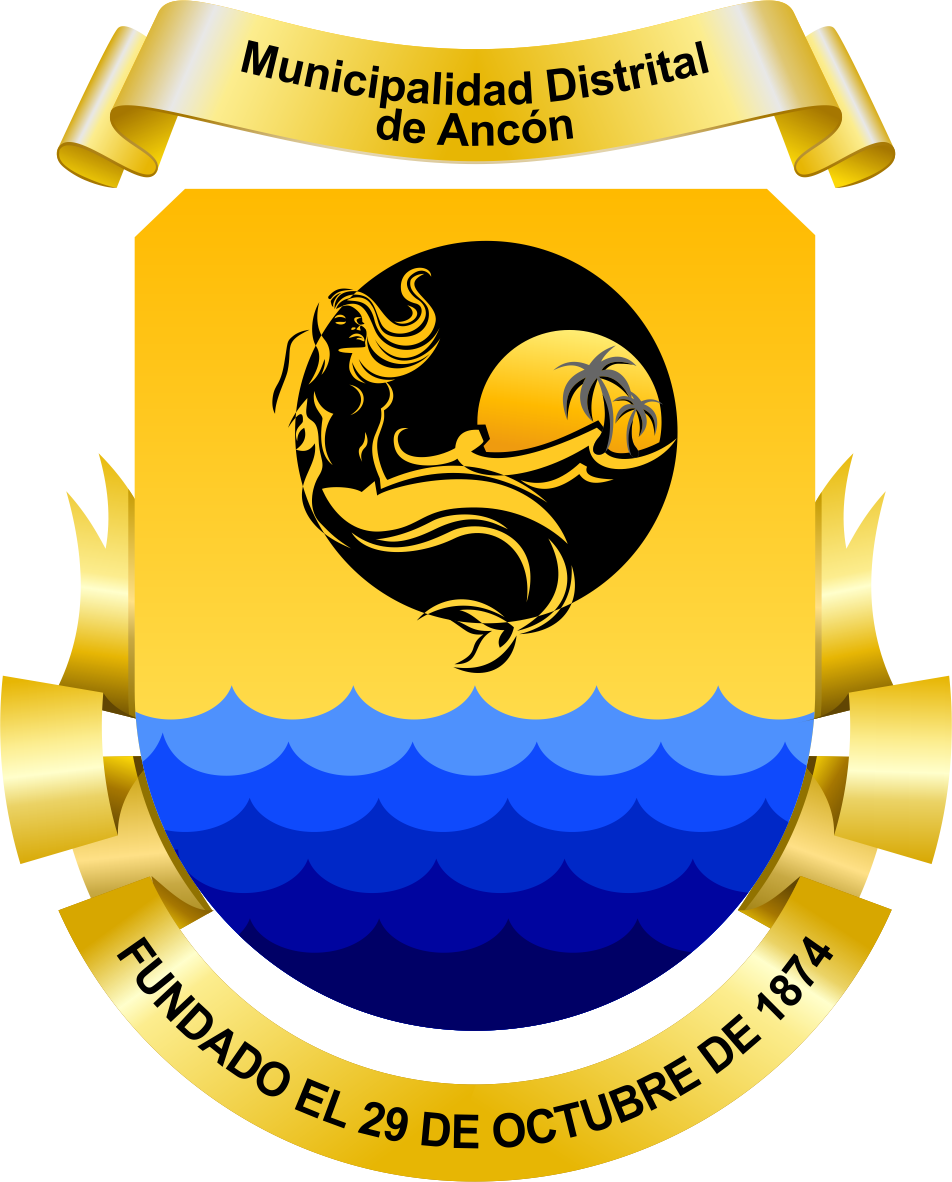 Distrito de Ancón - Provincia de Lima - Región Lima